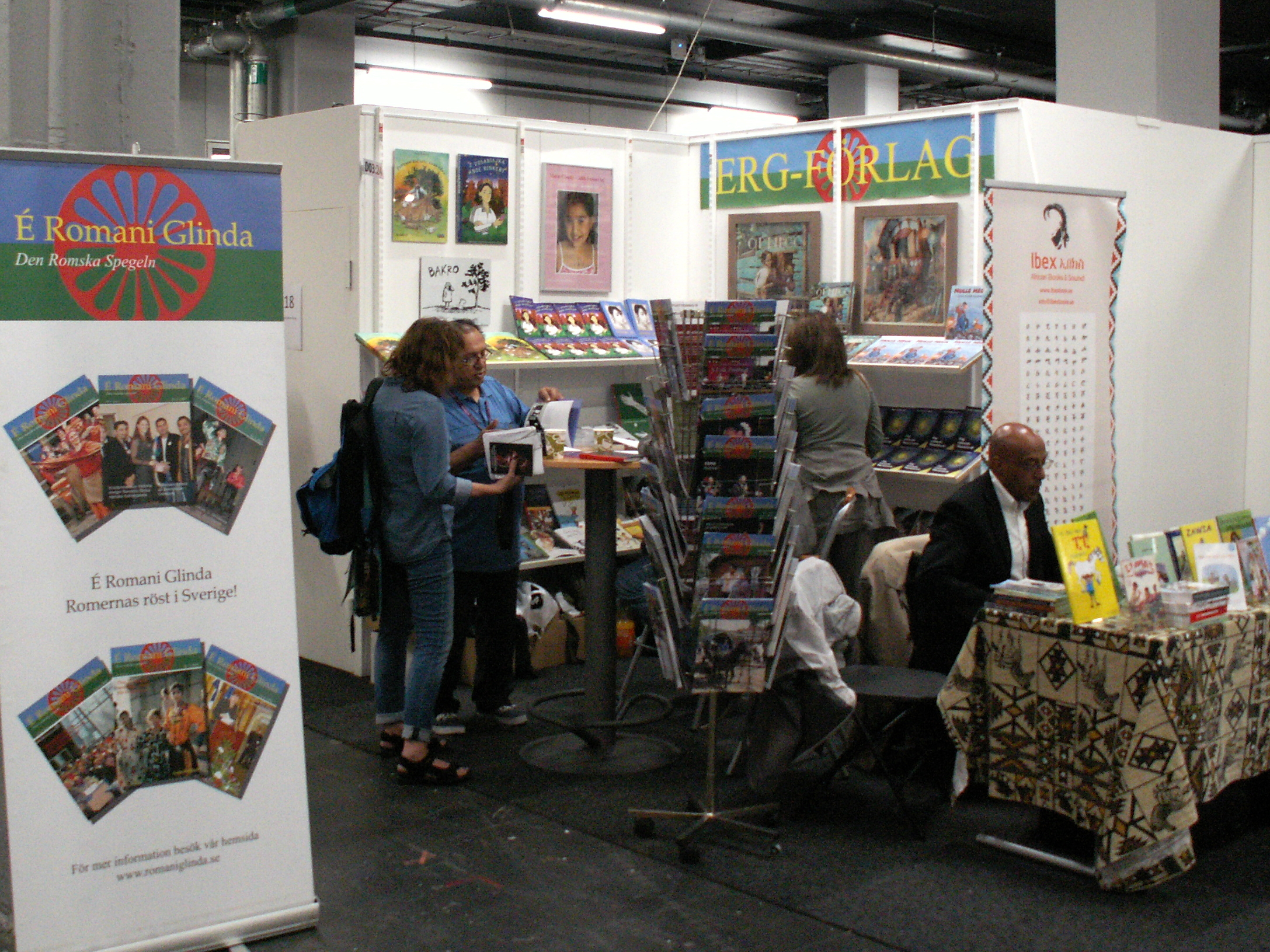 É Romani Glinda vid Mångspråkstorget, på Bokmässan i Göteborg 2016.